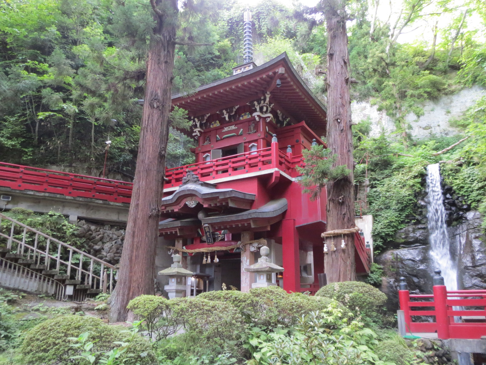 福島市にある中野不動尊